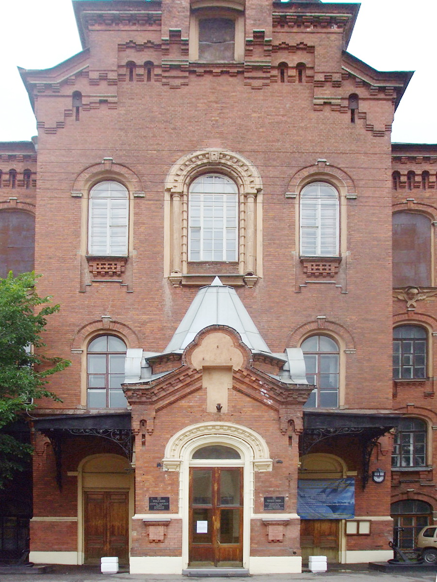 Косая линия (Санкт-Петербург)